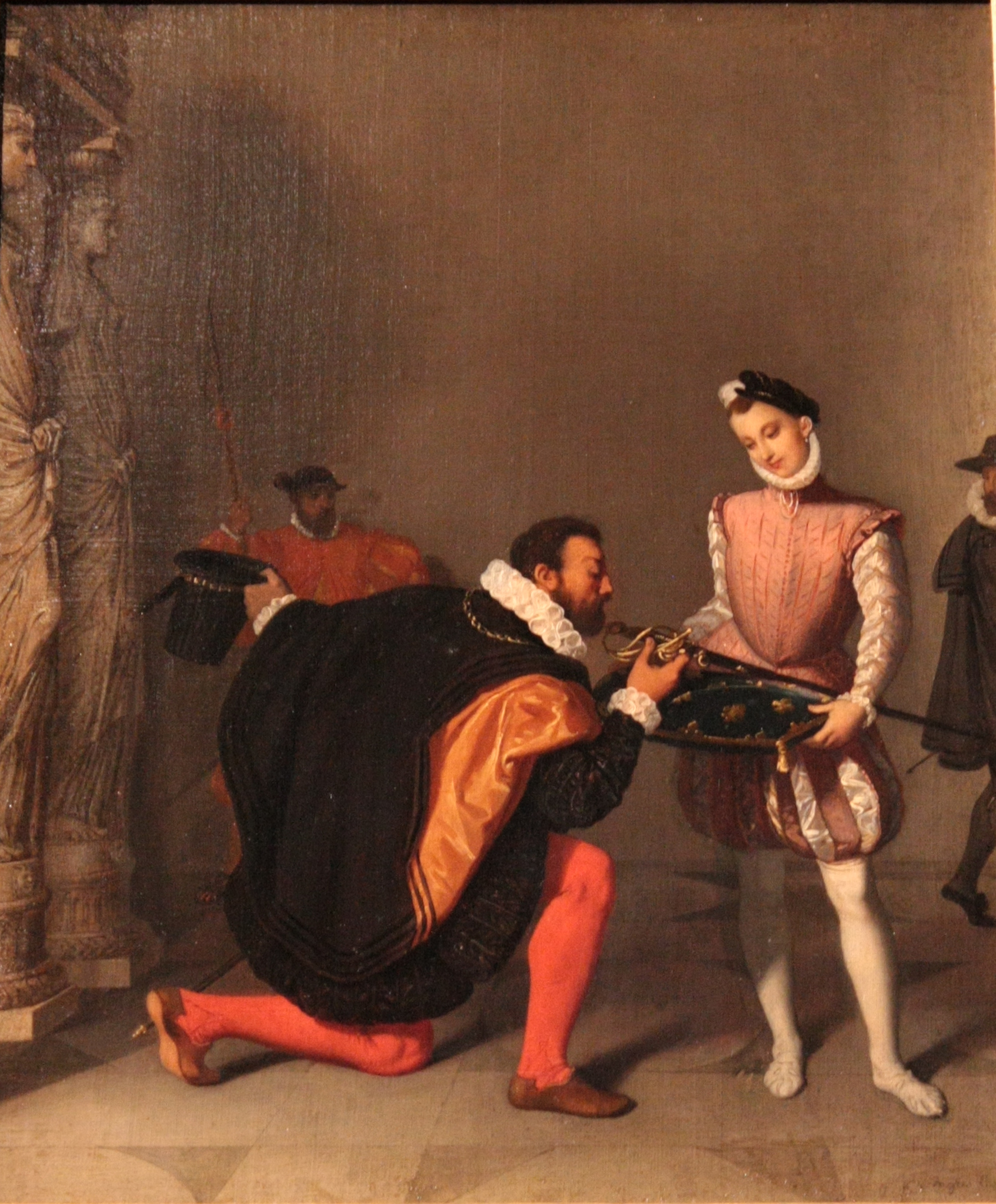 Don Pedro de Tolède baisant l'épée d'Henri IV par Jean-Auguste-Dominique Ingres, 1819